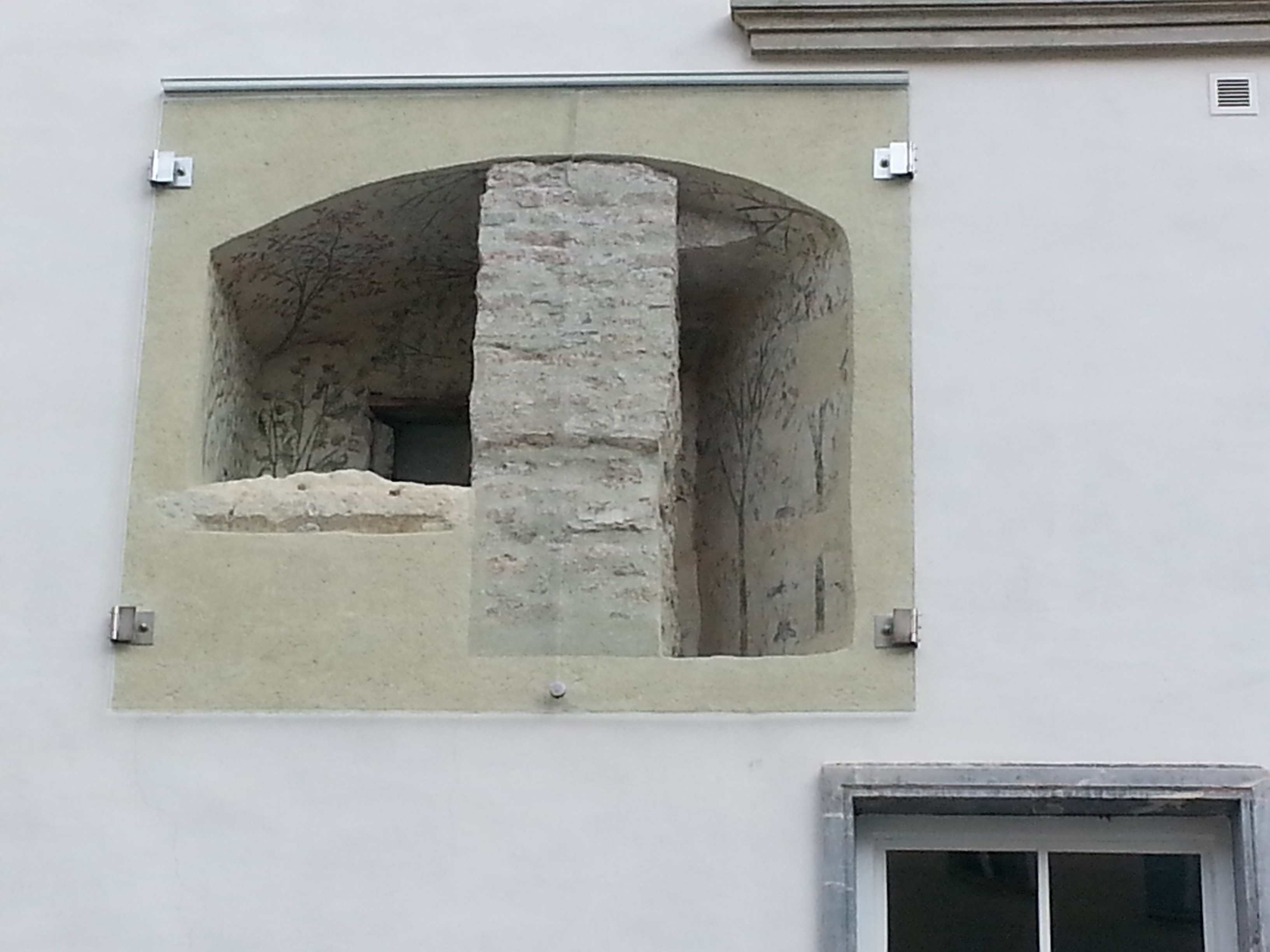 Eine 2013 freigelegte Wandnische mit Malerein an einer Mauer des Karlbaues in der Grazer Burg.